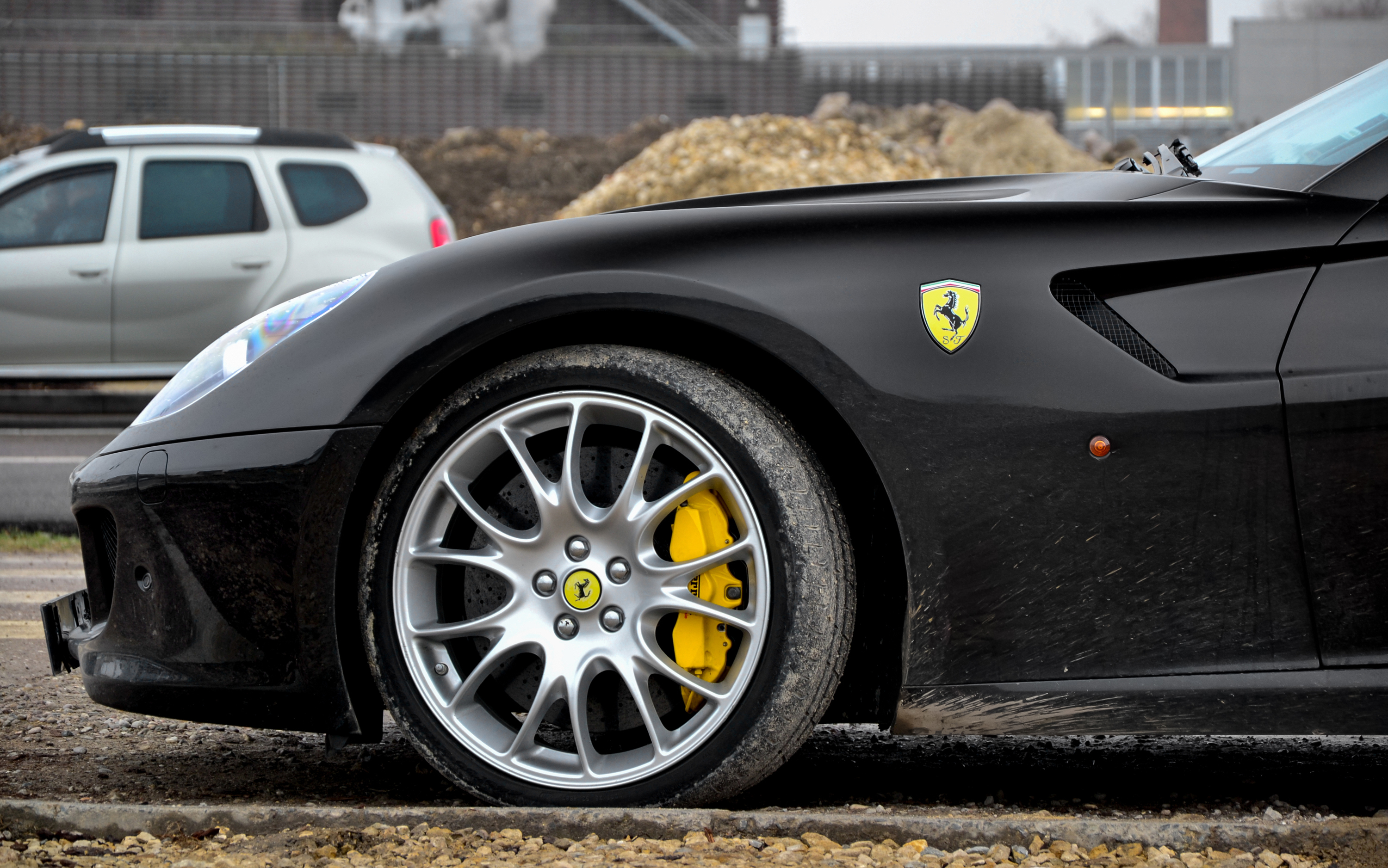 Cerchio di una Ferrari 599 GTB Fiorano Nera